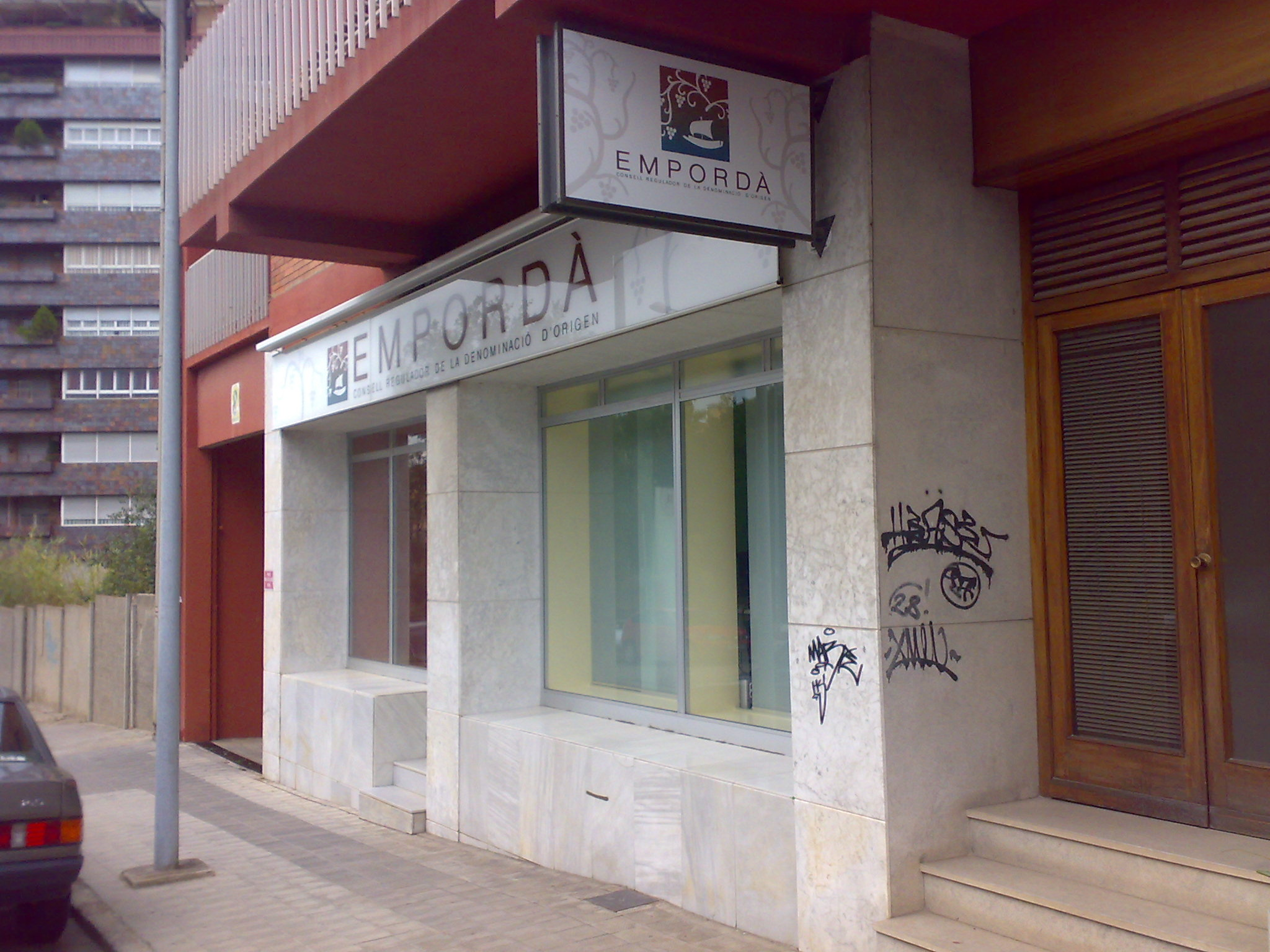 DO Empordà